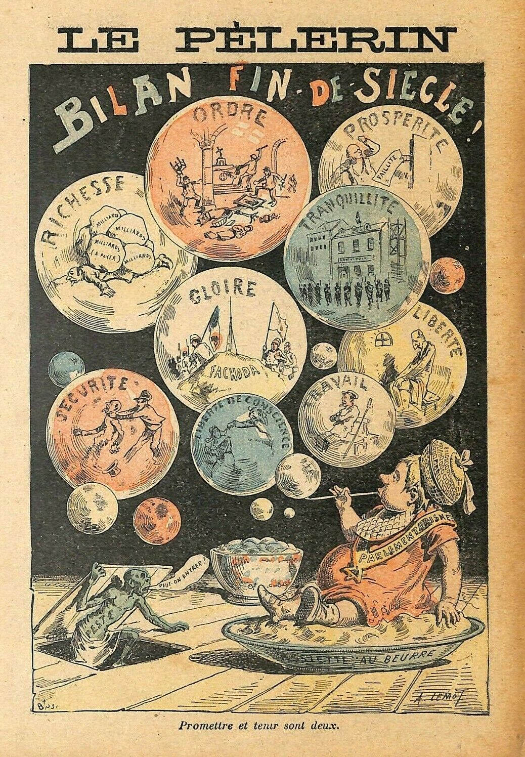 Caricature du journal Le Pèlerin